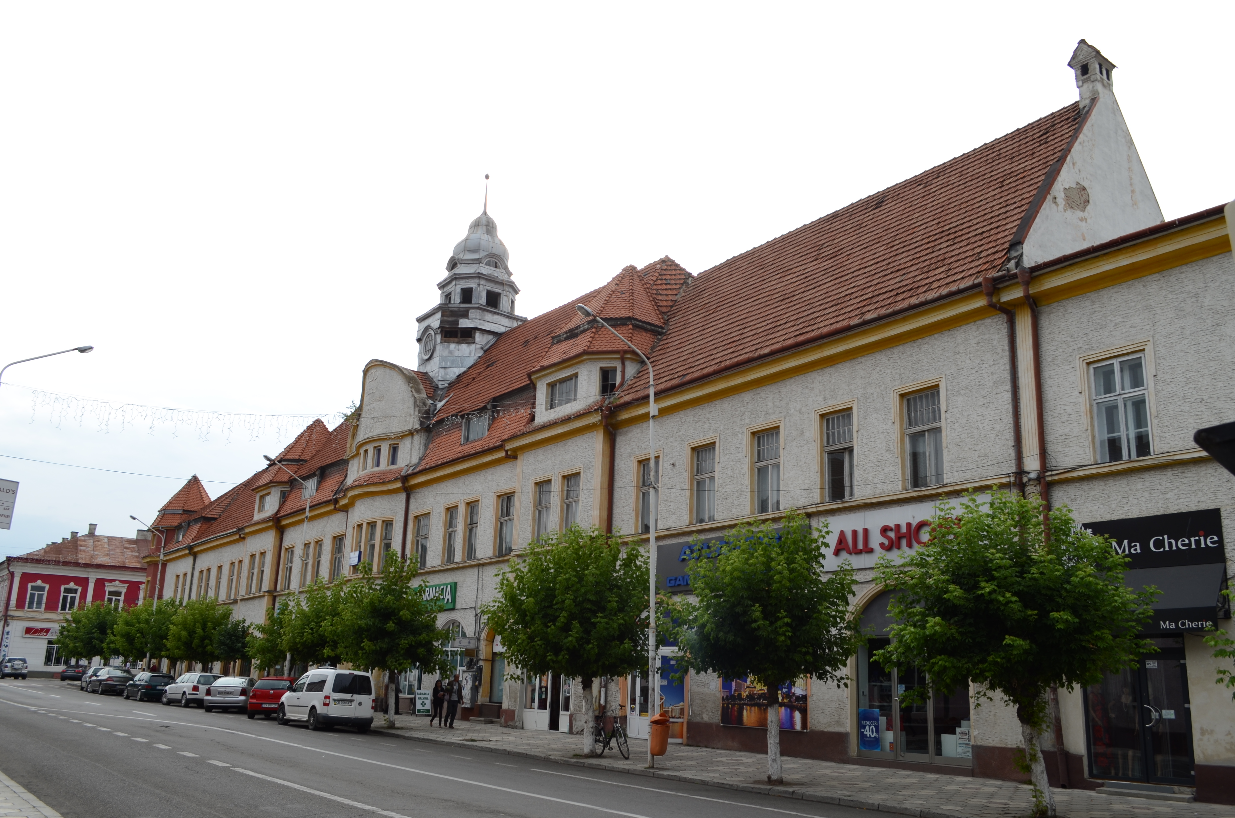 Fosta prefectură și hotel, Piața Unirii nr. 67, Rădăuți